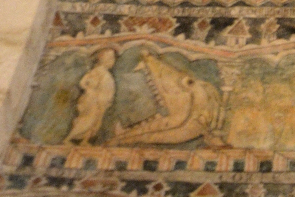 San Martin Tourskoaren eliza erromanikoa (Gazeo, Iruraitz-Gauna, Araba)